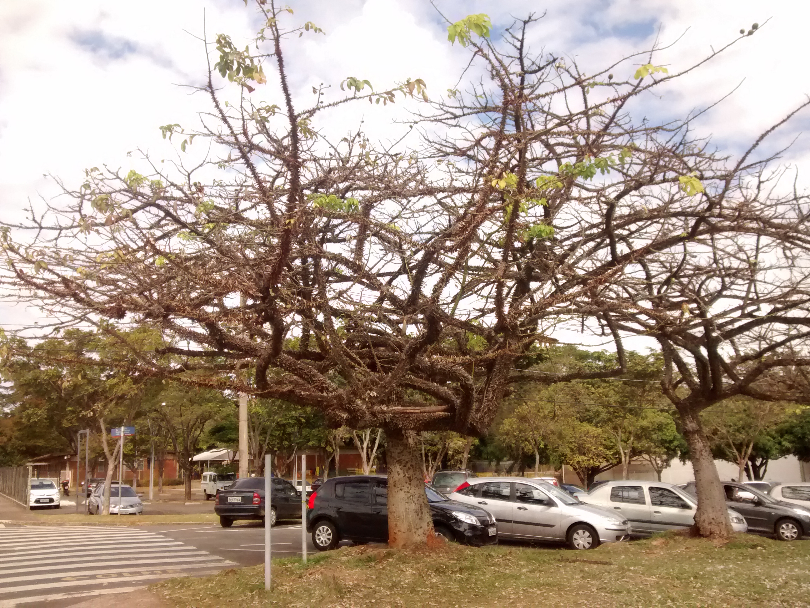 Ceiba erianthos no IB - unicamp, Campinas - SP - BR.